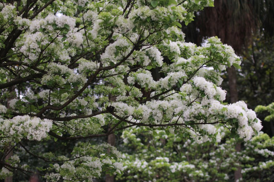 中文（台灣）: 國立台灣大學校園的流蘇樹。